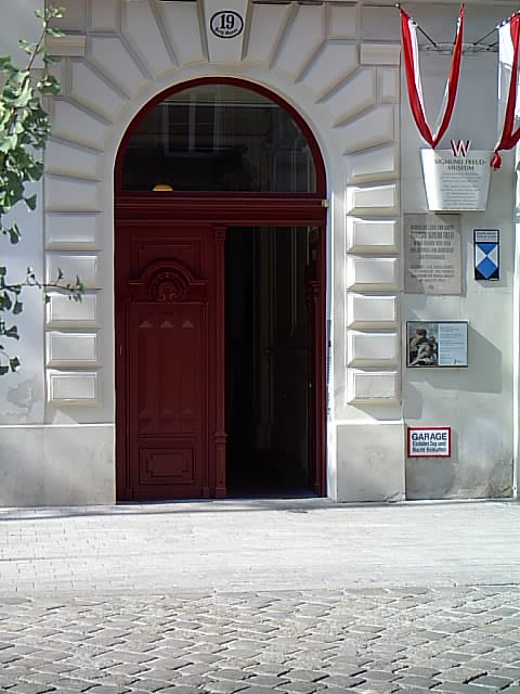 Der Eingang zur ehemaligen Wohn- und Arbeitsstätte von Sigmund Freud in Wien.